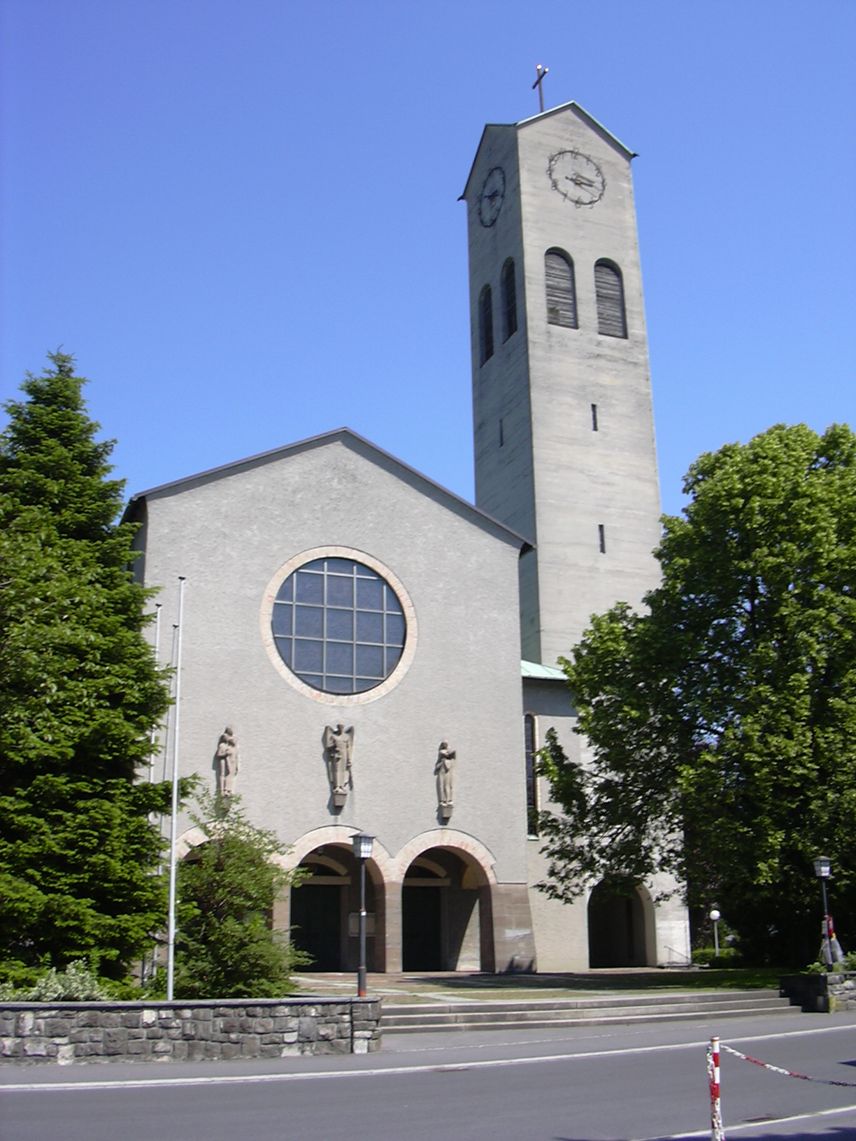 Erlöserkirche in Lustenau